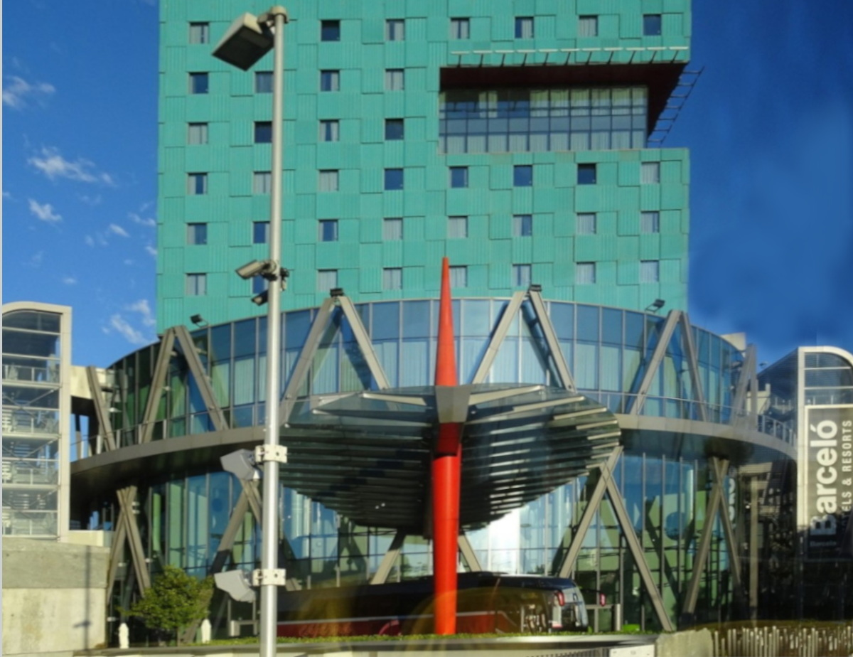 Façade de l' Hotel Barceló Milano Italy